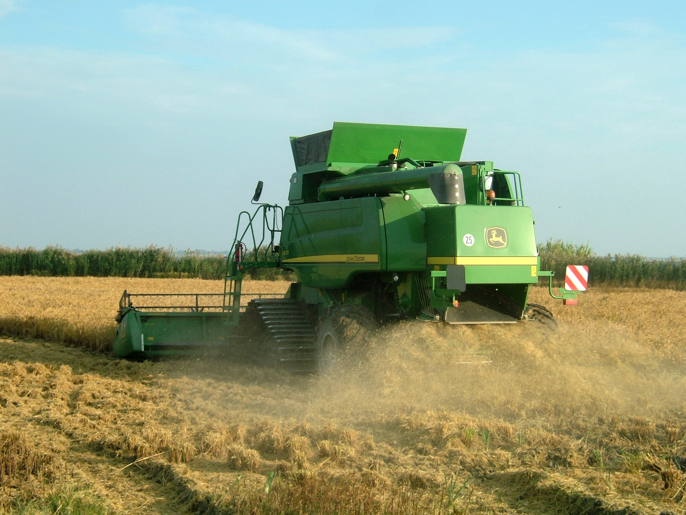 Récolte du riz en Camargue, John Deere C570 (C670?)